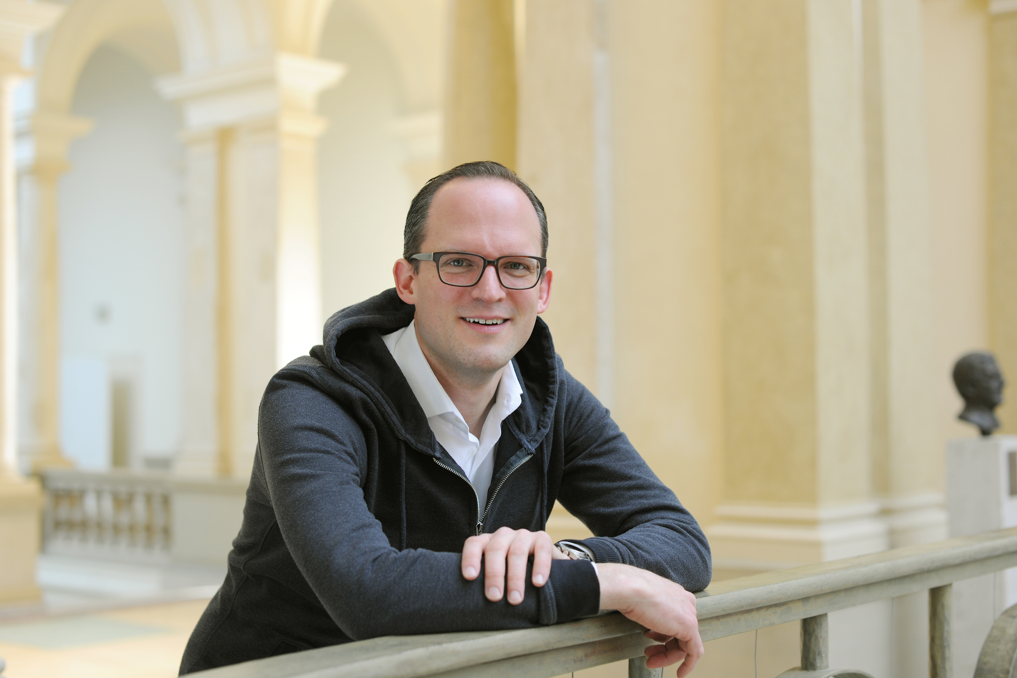 Sebastian Walter, Abgeordneter der Grünen-Fraktion Berlin